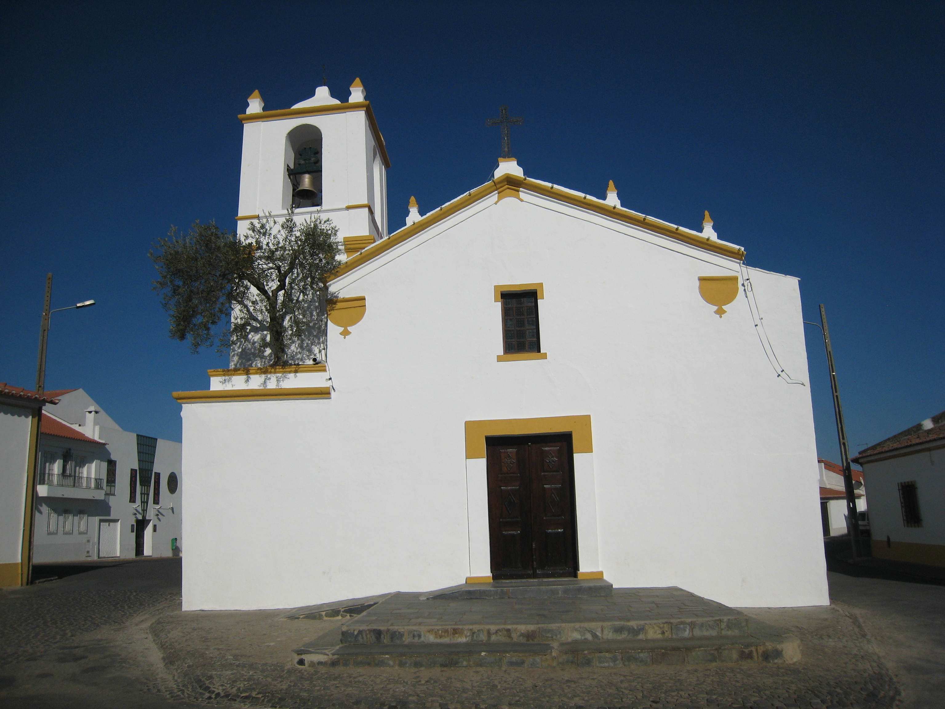 Igreja Matriz da Amareleja, Amareleja, Alentejo, Portugal.